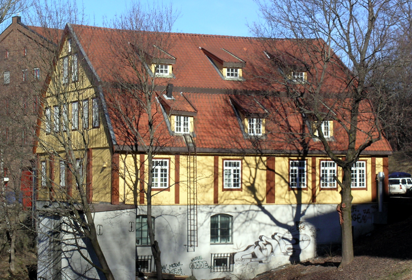 Glademøllen (Nedre papirmølle), Sandakerveien 10, Oslo. Built 1736.